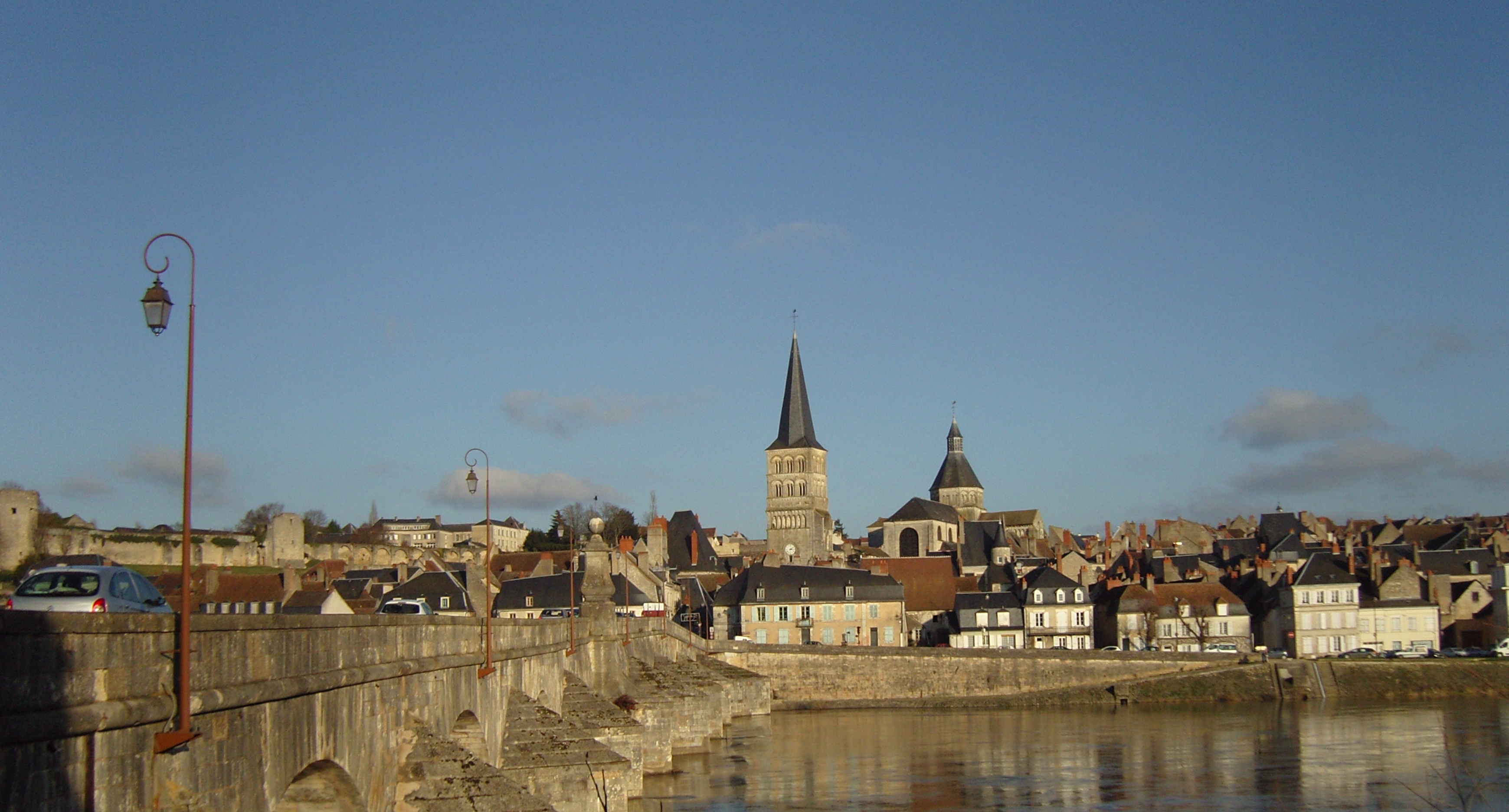 Panorama über die Loire hinweg von La Charité-sur-Loire (58), Frankreich. Auf der Mitte der Brücke steht eine barocke Pyramide, gekrönt von einer Kugel, welche die königlichen Lilien zeigt. Im Laufe der Revolution wurde die Kugel zerstört, und an der Pyramide wurden die Menschenrechtserklärung angebracht. Erst in neuerer Zeit konnte die Kugel dank eines privaten Spenders wieder hergestellt und angebracht werden.